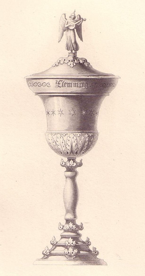 Flemming - Pokal der Zelterschen Liedertafel in Berlin. Heliogravüre der Zeichnung von Karl Friedrich Schinkel aus: „Die Geschichte der Zelterschen Liedertafel von 1809-1909“ dargestellt nach den Tafelakten von Prof. Hermann Kuhlo